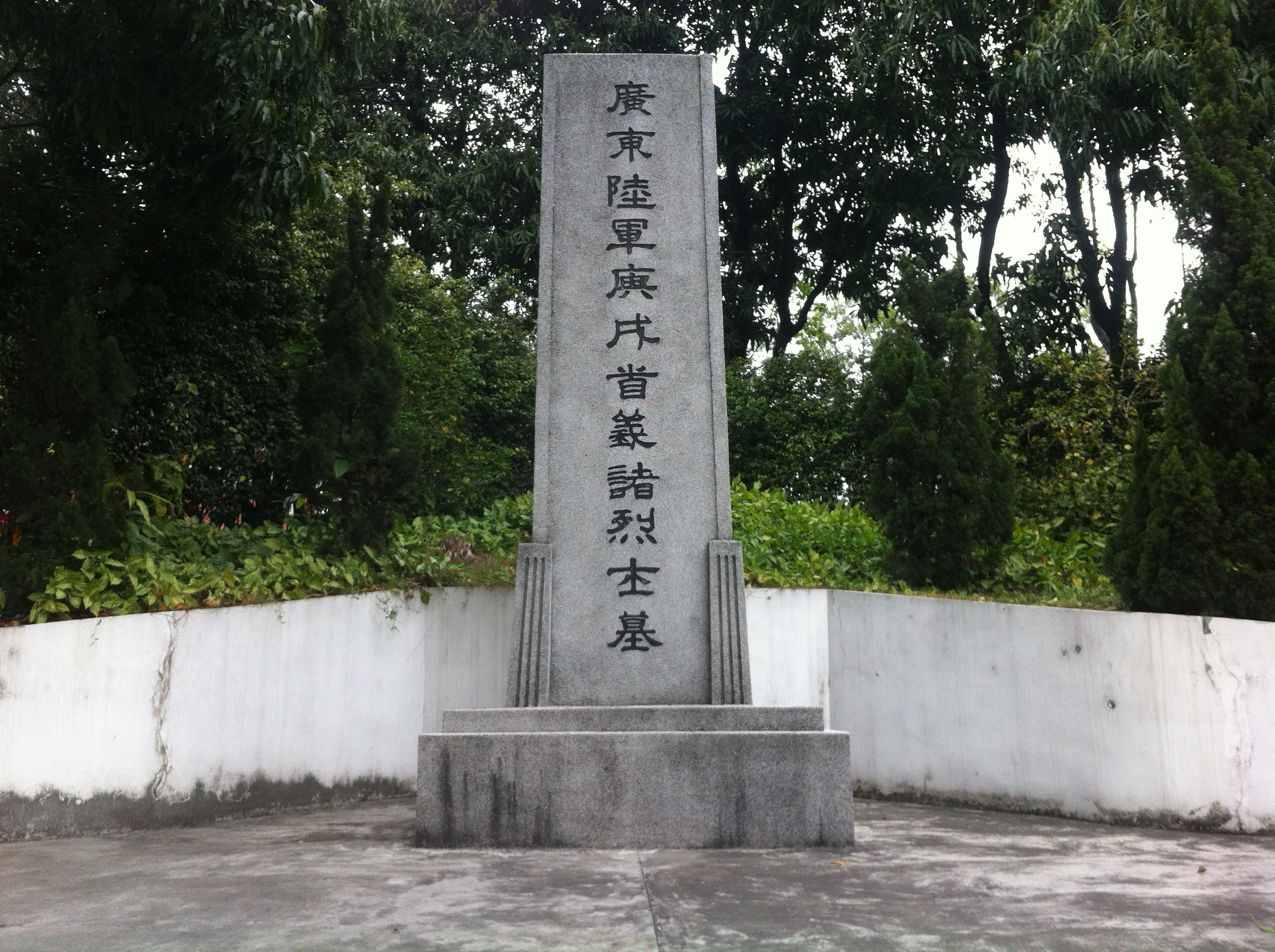 廣東陸軍庚戌首義諸烈士墓，位於廣州市先烈中路。